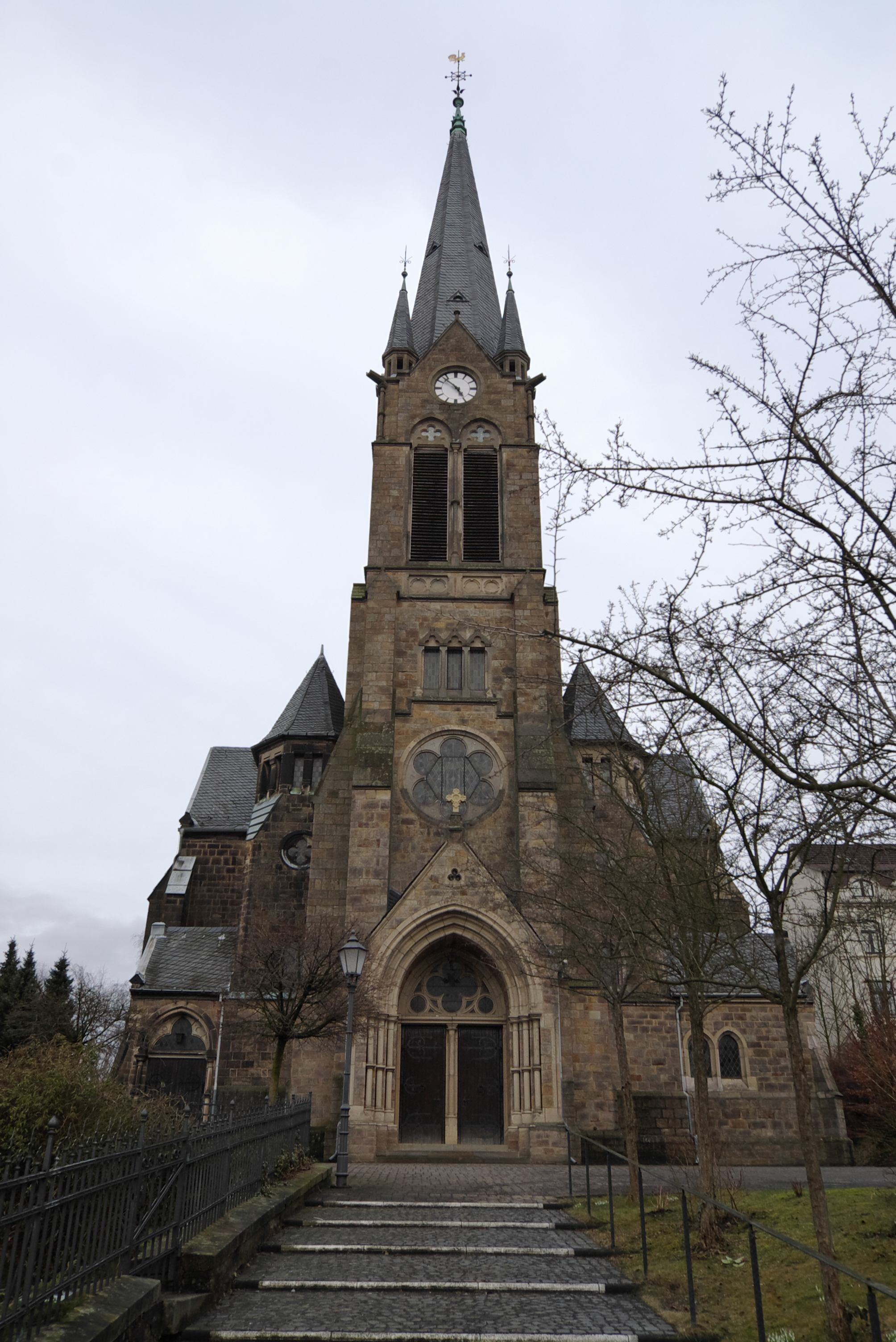 Evangelische Christuskirche Hagen Eilpe